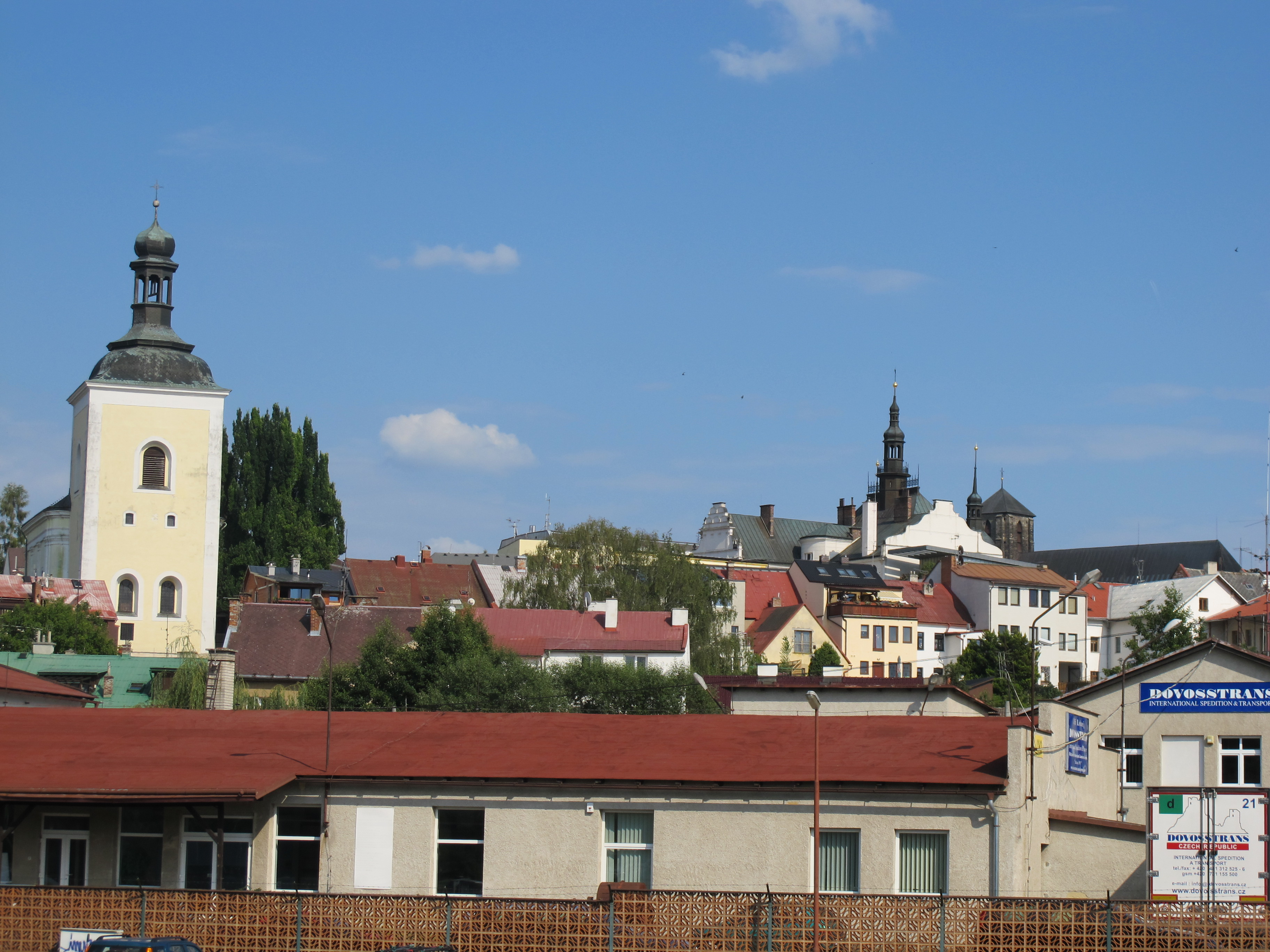 Turnov: pohled od autobusového nádraží